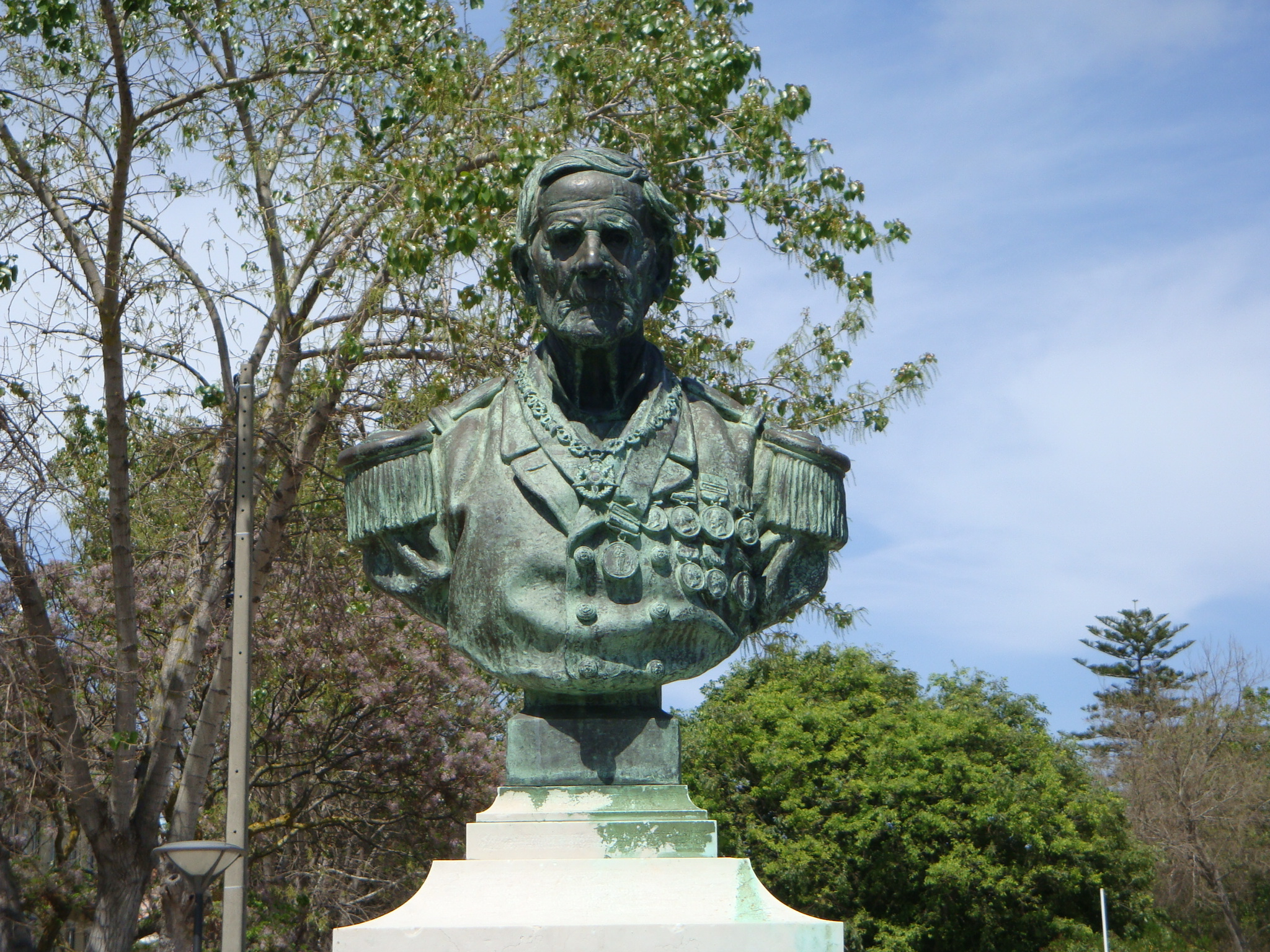 Busto do pescador e salvavidas patrão Joaquim Lopes